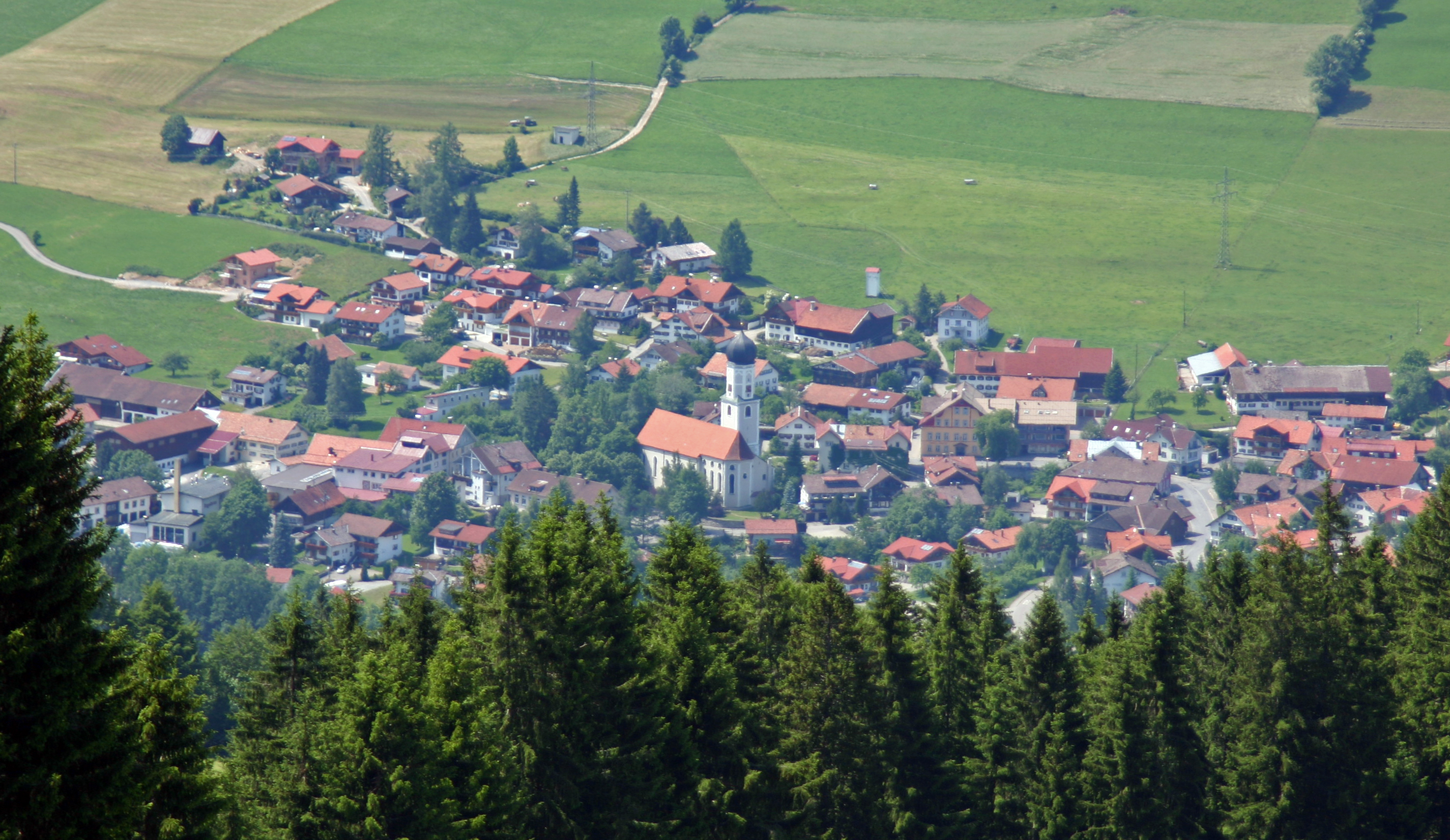 Blick vom Grünten auf den Ortskern von Rettenberg im Oberallgäu.